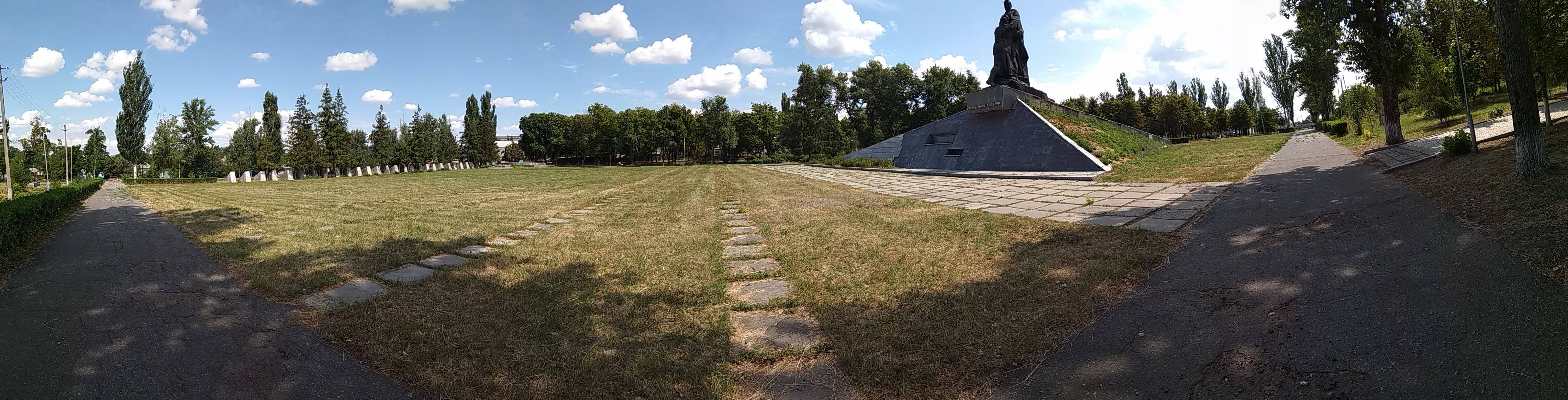 Пам'ятник "Україна - визволителям" у містечку Мілове на Луганщині